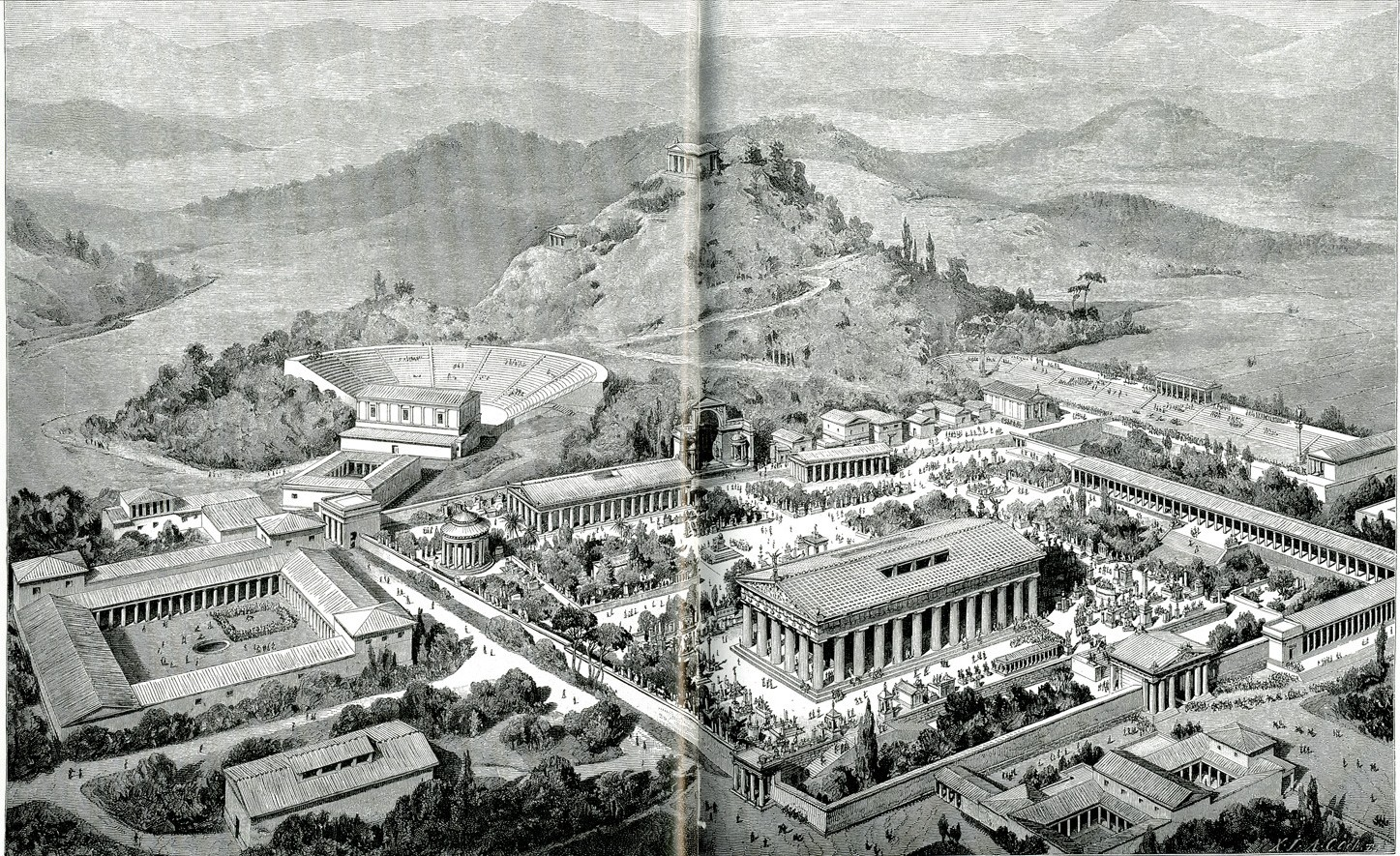 Ιάκωβος Φάλκε. Ελλάς, ο Βίος των Αρχαίων Ελλήνων. Κατά το γερμανικό του Ιακώβου Φάλκε, Ν. Γ. Πολίτης (μετ.), Αθήνα, Κάρολος Βίλμπεργκ, 1887